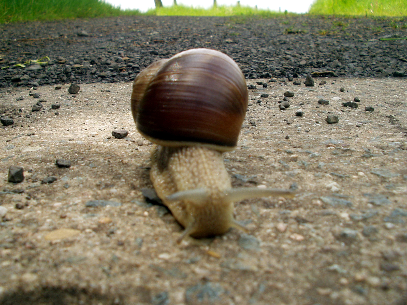 Snail